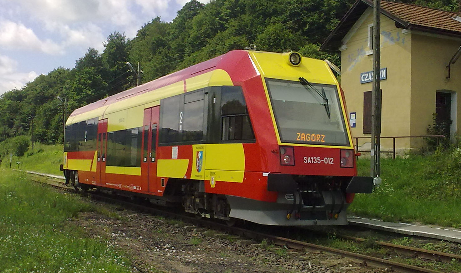 Szynobus Pesa SA 135-012 w stacji Czaszyn.